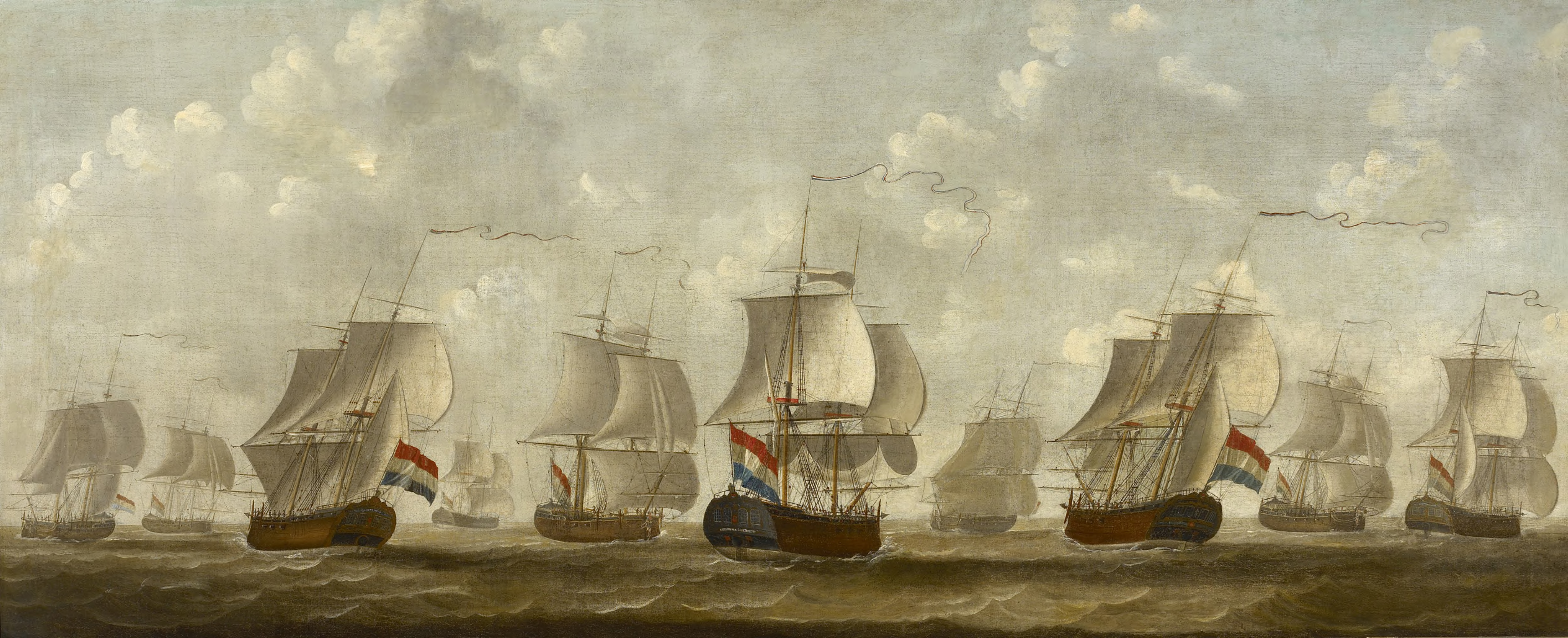 Gezicht op een aantal schepen van de Middelburgsche Commercie Compagnie van diverse zijden